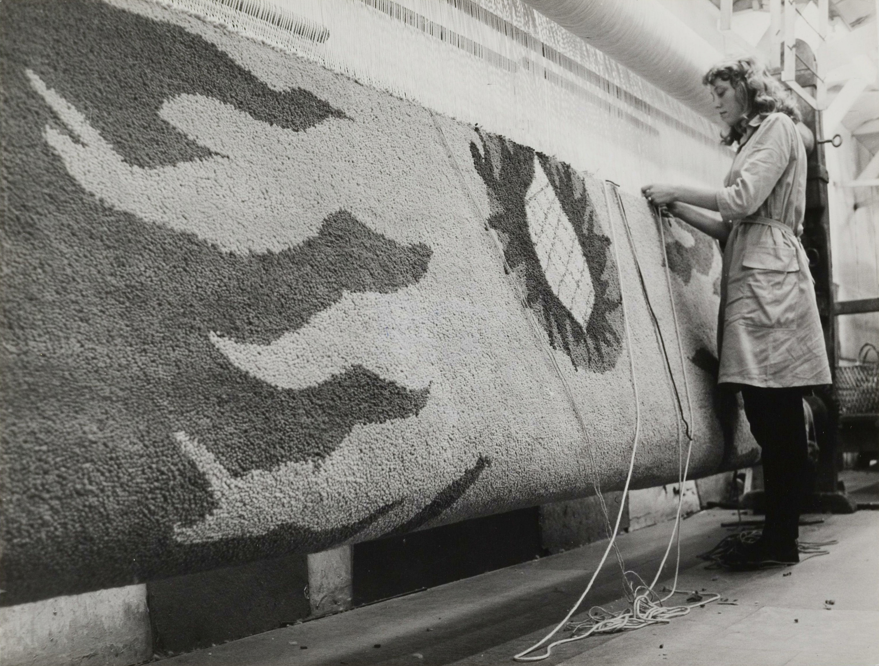 Kinheim tapijt, voormalig Stadskantoor Beverwijk. Tapijt voor de raadszaal gemaakt door handtapijtknoperij 'Kinheim'en geschonken door de Hoogovens t.g.v. de opening. Fototitel:(F399936E-FB8E-11DF-9E4D-523BC2E286E2) 0 Collectie: foto's van de gemeente Beverwijk, Collectie van Inventarisnummer: NL-HlmNHA_1337_KNA002001152 Soort: Foto Beschrijving: President Kennedyplein 1. Stadskantoor, tapijt voor de raadszaal gemaakt door handtapijtknoperij 'Kinheim'en geschonken door de Hoogovens t.g.v. de opening. Datering: 1965 - 1967 Documenttype: Topografische prenten, tekeningen en foto's Provincie: Noord-Holland Gemeente: Beverwijk Plaatsnaam: Beverwijk Straatnaam: President Kennedyplein Auteursrecht: Nee Techniek: Foto